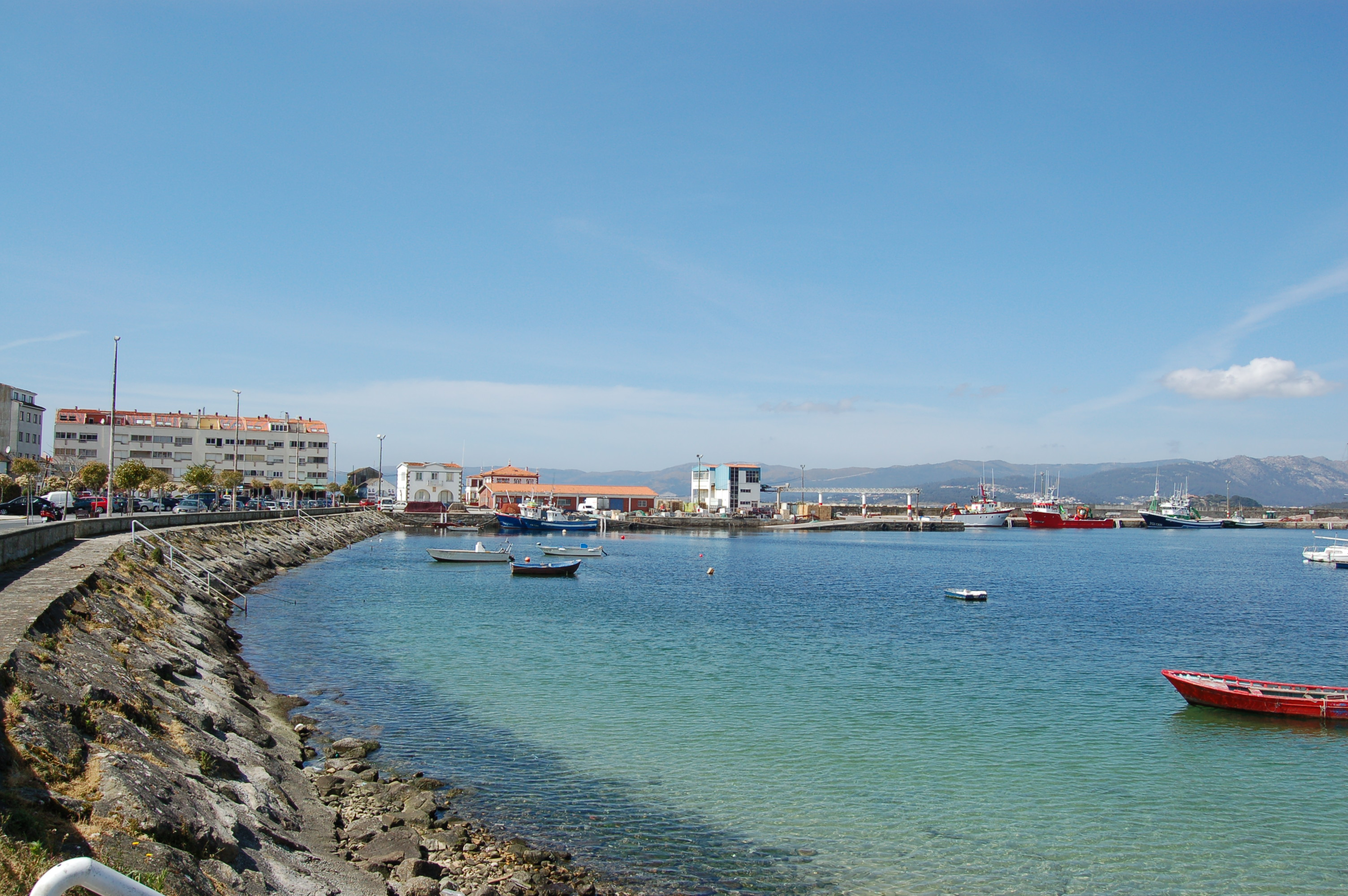 Vista de Portosín (Goiáns, Porto do Son)